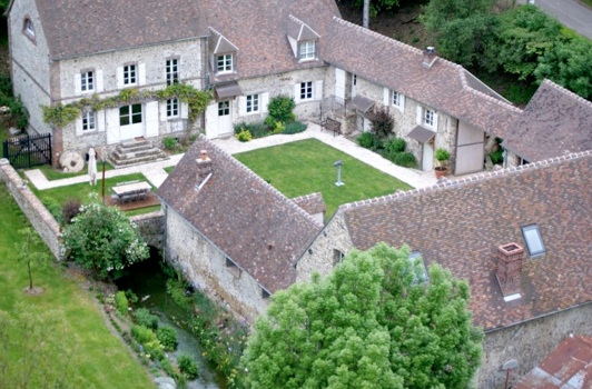 Vue aérienne 2009